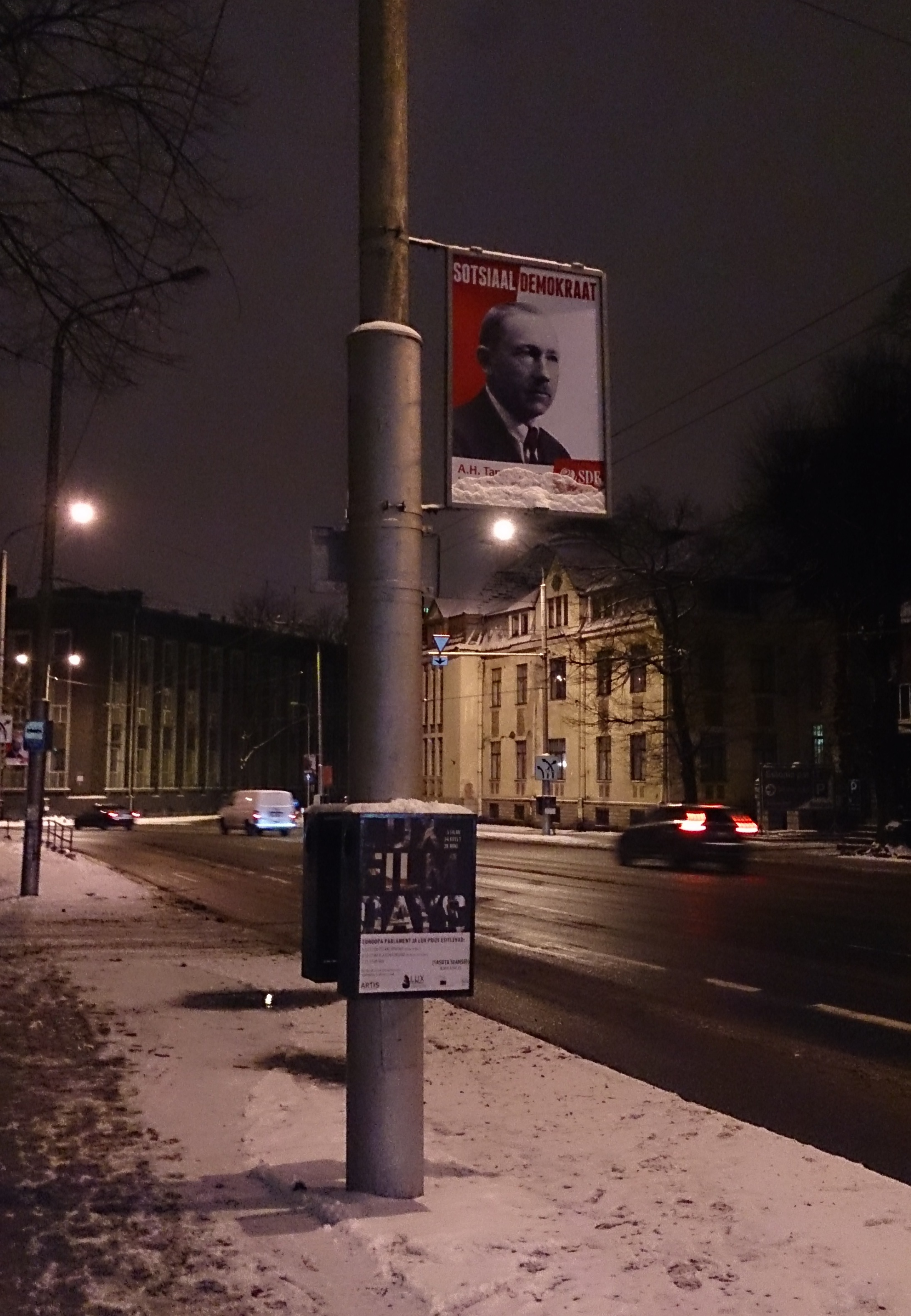 SDE valimisplakat A.H.Tammsaarega Estonia puiesteel Tallinnas